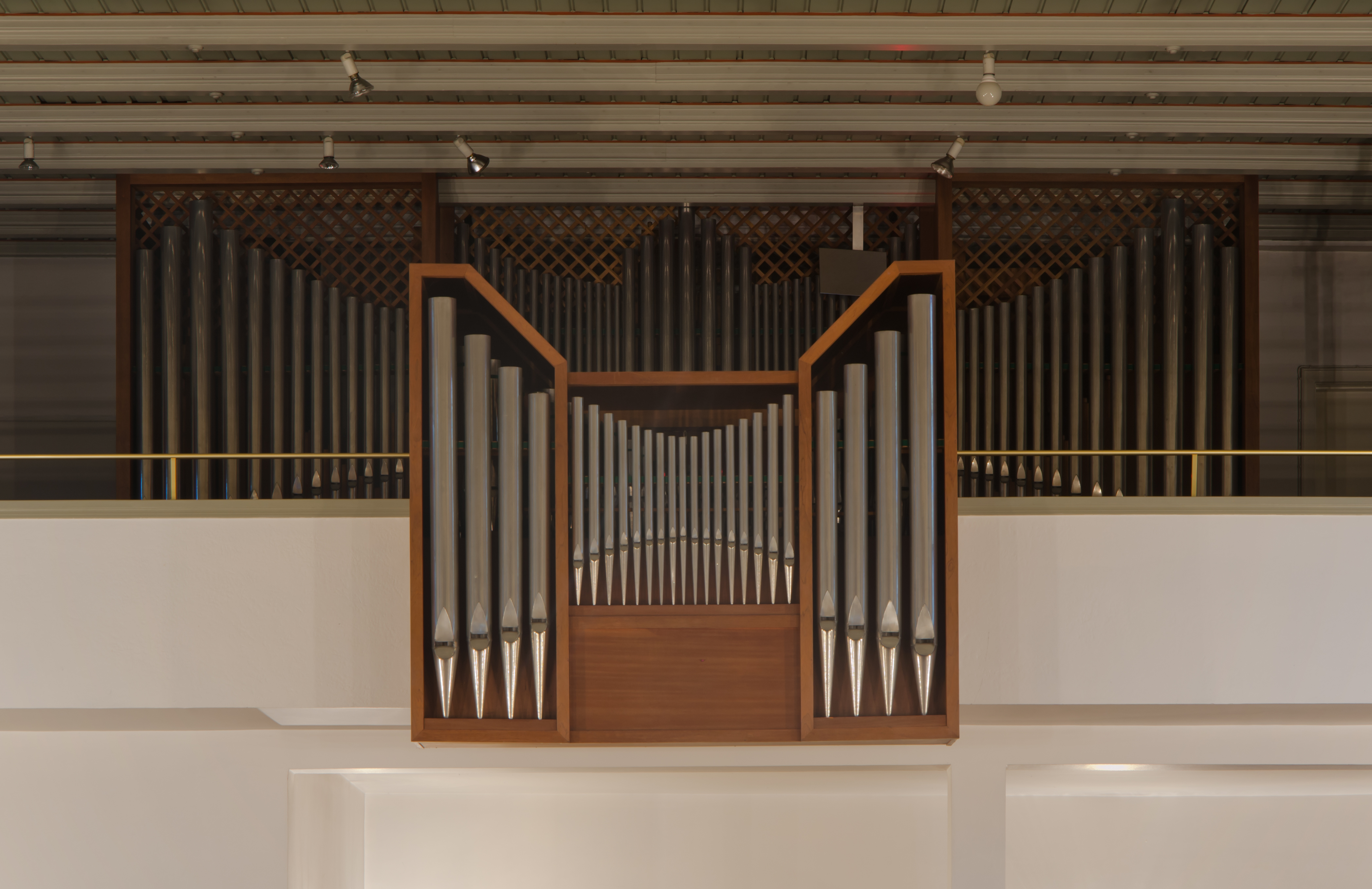 Thomaskirche HH-Rahlstedt Orgel